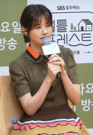 12일 오후 서울시 양천구 목동 SBS에서 SBS 월화 예능 ‘리틀 포레스트’ 제작발표회가 열려 배우 이승기, 이서진, 정소민, 개그우먼 박나래가 참석해 기자와의 질의 응답시간을 갖고 있다.